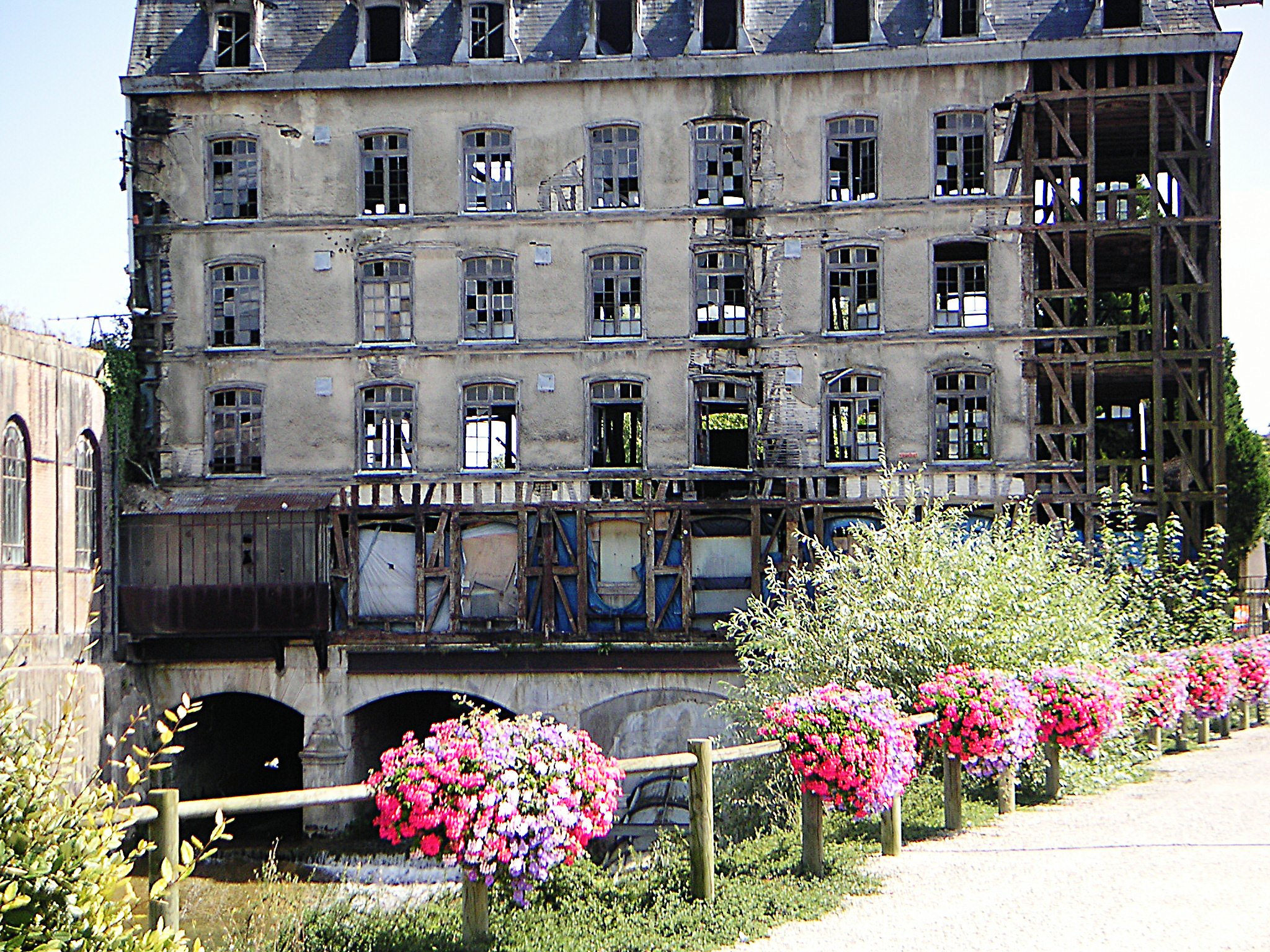 Bar-sur-Seine, le moulin